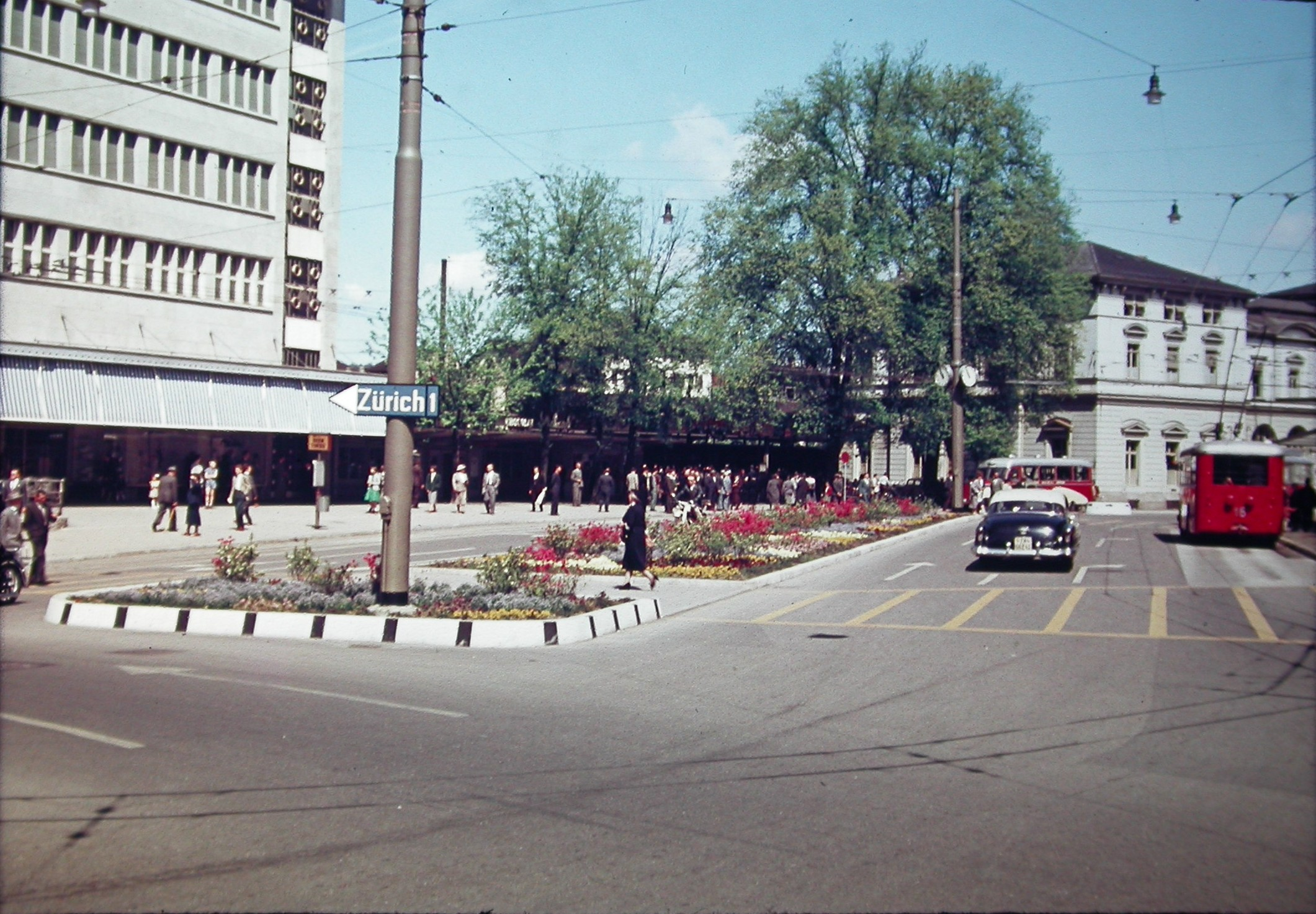 Hauptbahnhof Winterthur in den 50er-Jahren